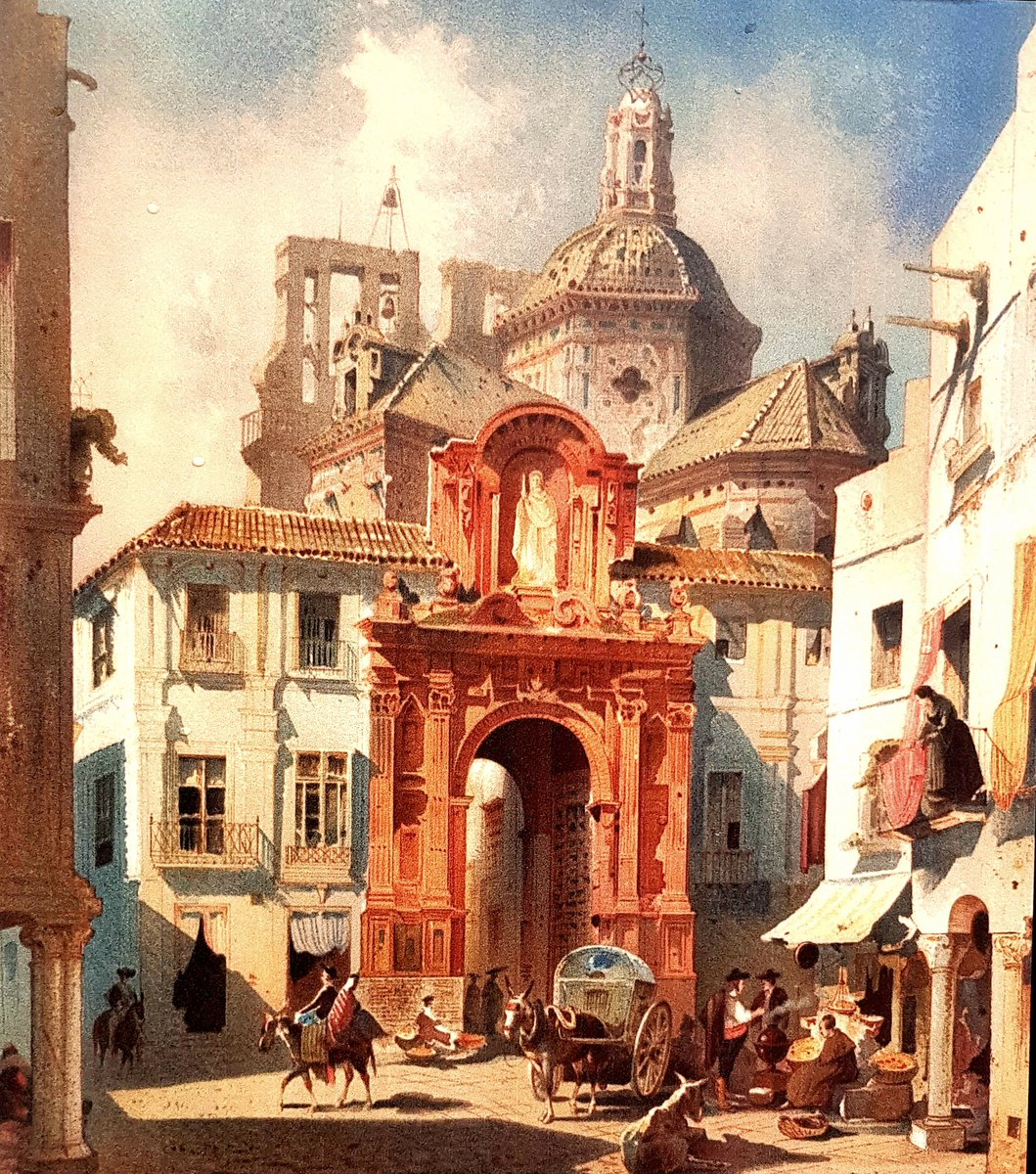 Convento de San Pablo y casa de Murillo. 472 x 350 mm. Cromolitografía. Álbum de Alexander Mest-Chersky, Spanien Ansichten nach Aquarell-zeichnungen, Dresde, 1861. Biblioteca del Palacio Real de Madrid. España.